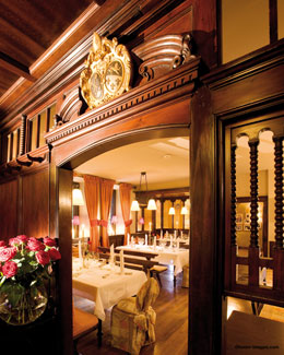 St. Peter Stiftskulinarium Salzburg (Bürgerstube)